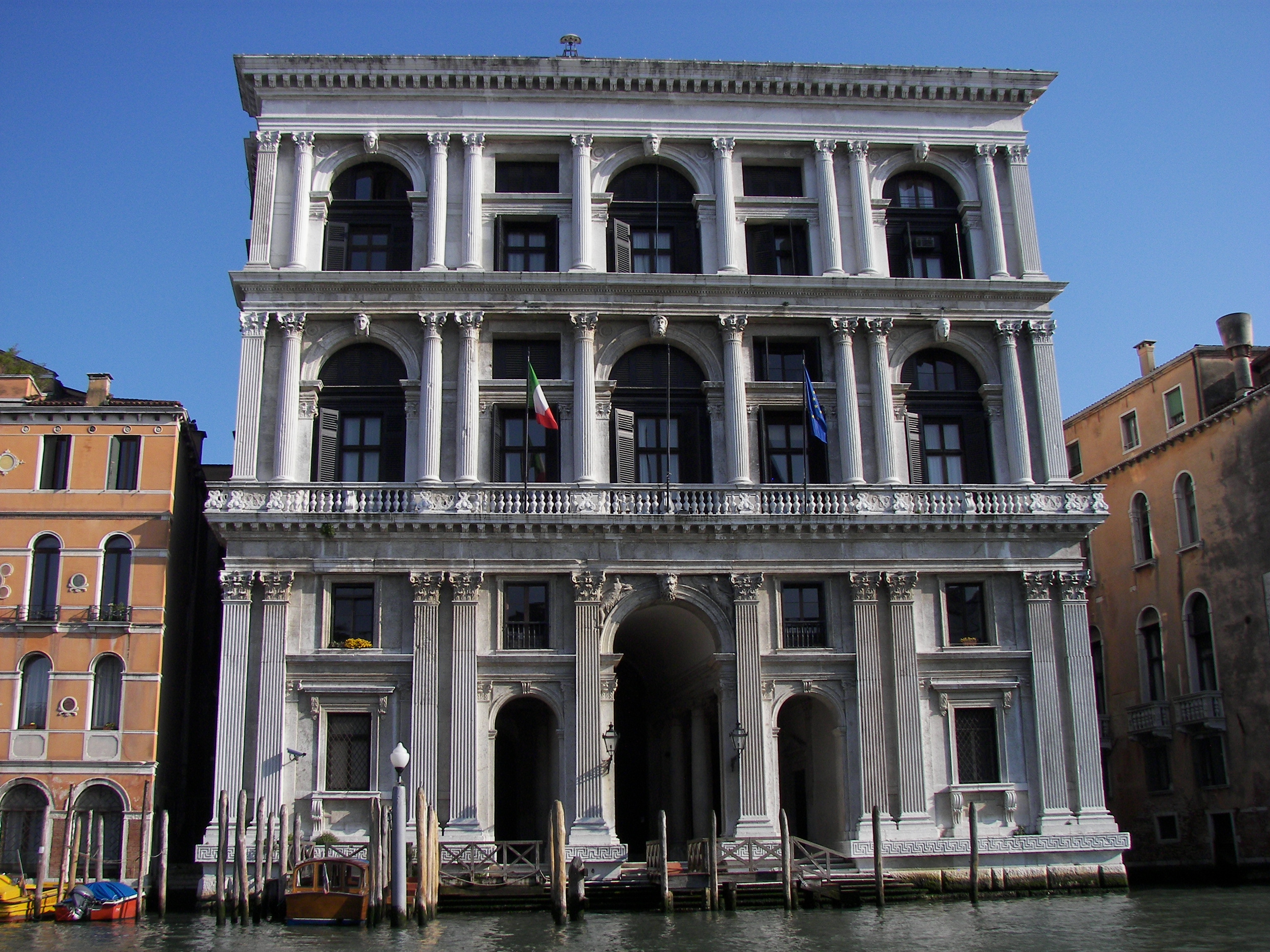 Palazzo Grimani di San Luca in Venezia